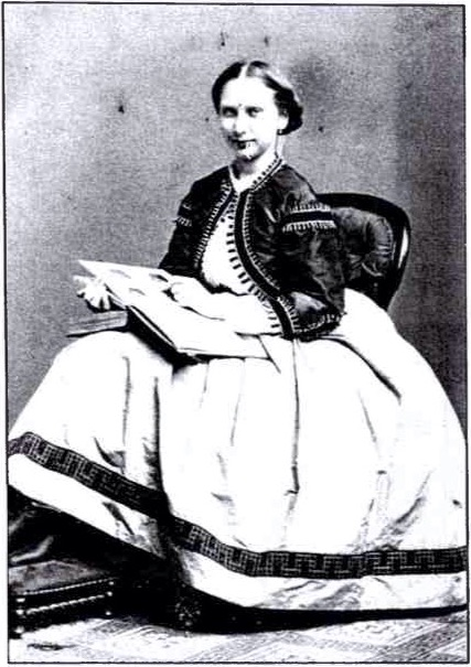 Prinsessan Lovisa av Sverige, senare drottning Louise av Danmark. Foto av Bertha Valerius. Bernadottebiblioteket.